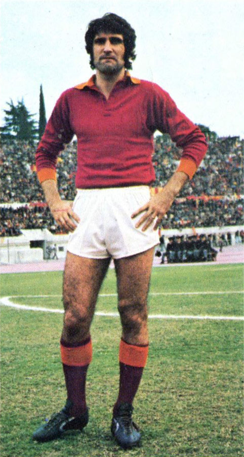 Il calciatore italiano Sergio Santarini alla Roma all'inizio della stagione 1974-75.